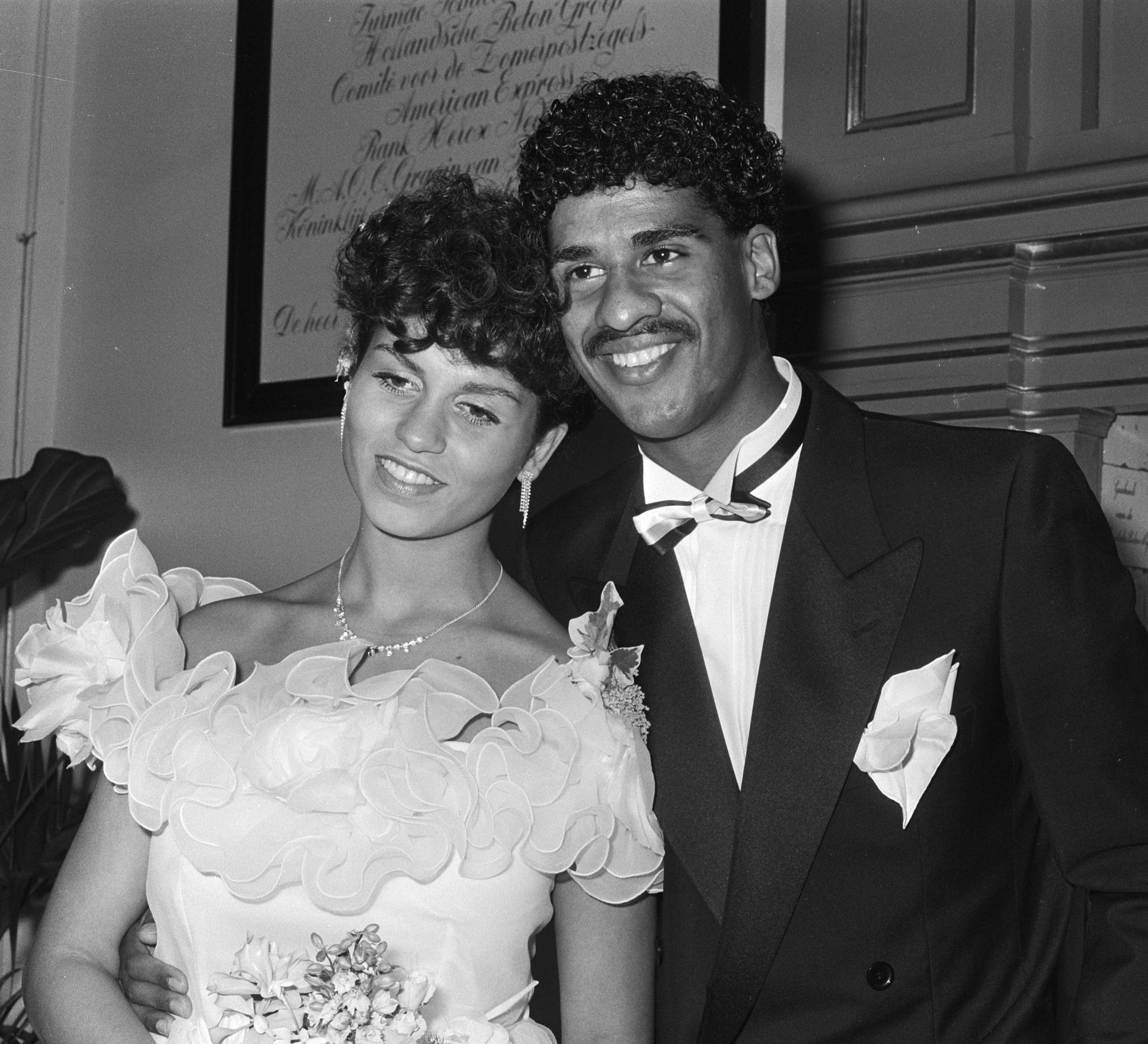 Voetballer Frank Rijkaard trouwt met Carmen Sandries